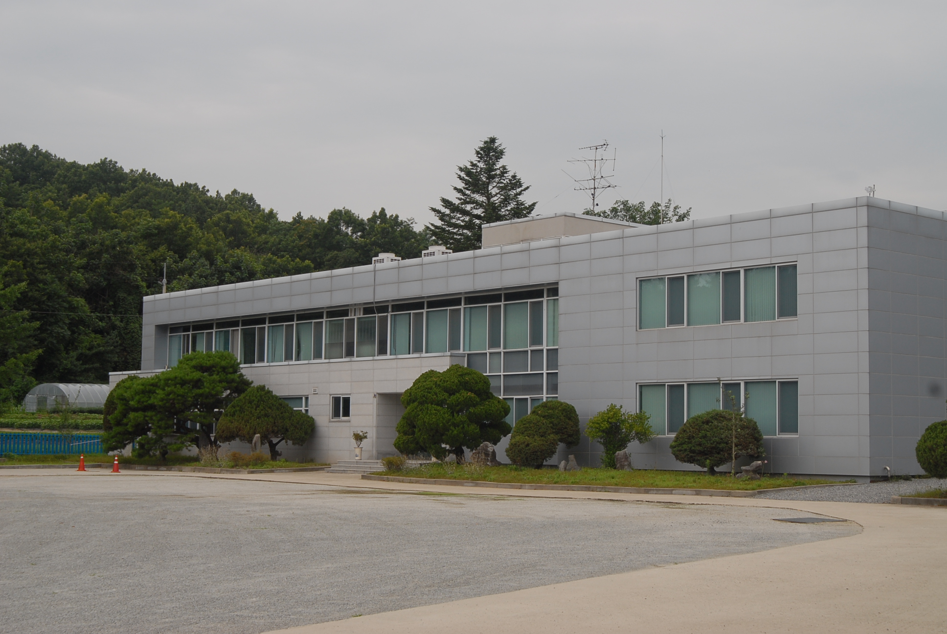 2009년 7월 중앙소방학교 시설